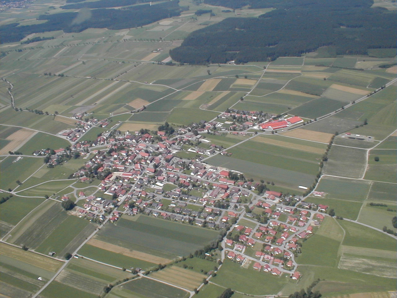 Winterrieden Air Photograph